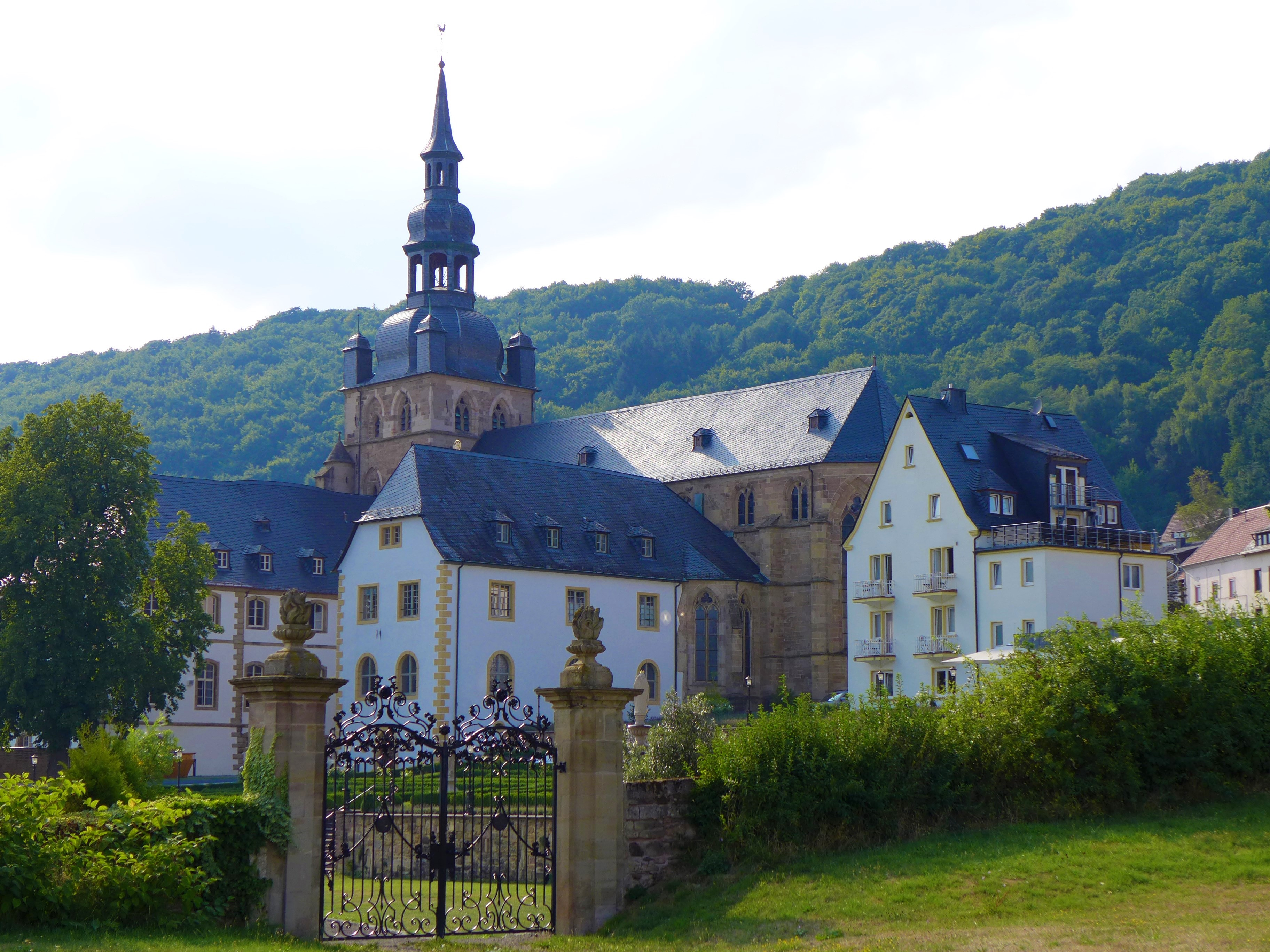 Benediktinerabtei St. Mauritius (Tholey), Abtei Tholey von Osten